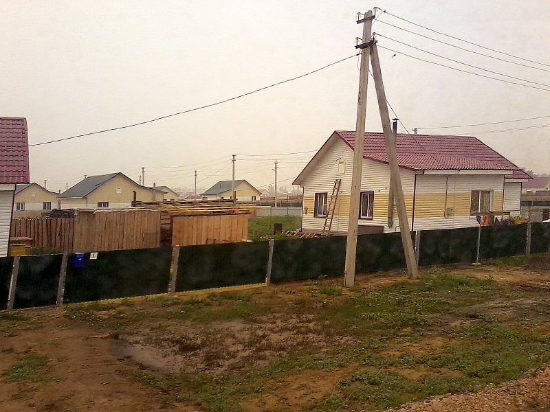 Село Николаевка, отстроенное после пожара 2010 года. Фото из автомобиля. 2012 год.